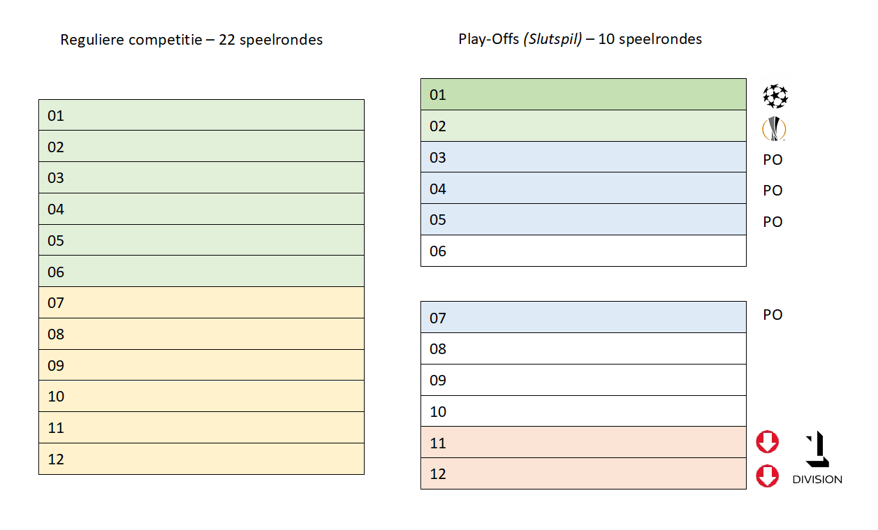 Schematische weergave van het competitieformat van de Deense Superliga (vanaf 2020)